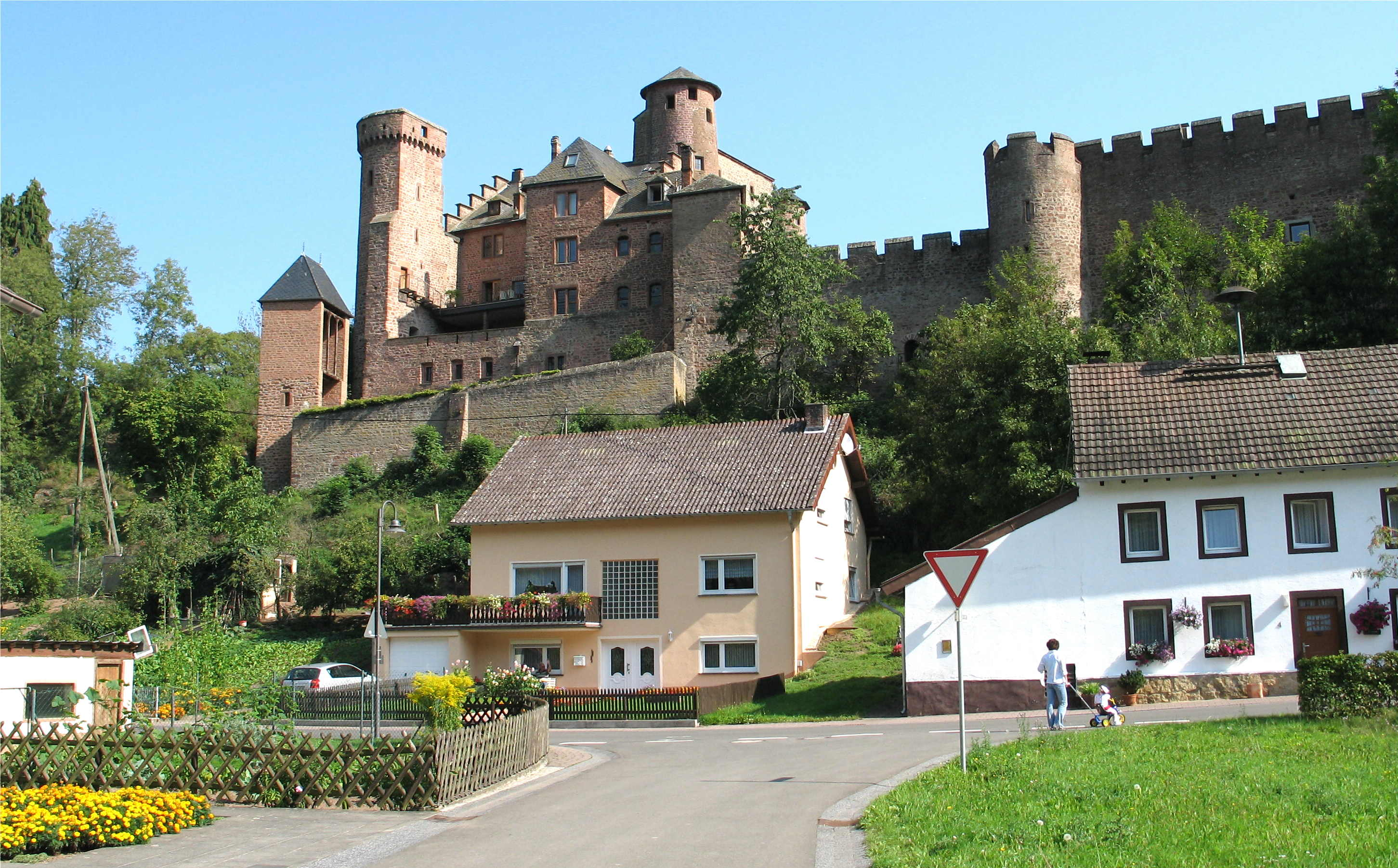 Hamm (Eifel)